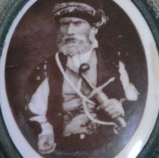 Photographie médaillon de Giuseppe Ferlini (23 avril 1797 – 30 décembre 1870), médecin de combat italien devenu explorateur et chasseur de trésor.